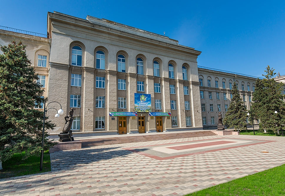 ГУК Курской ГСХА, ул. Карла Маркса, 70